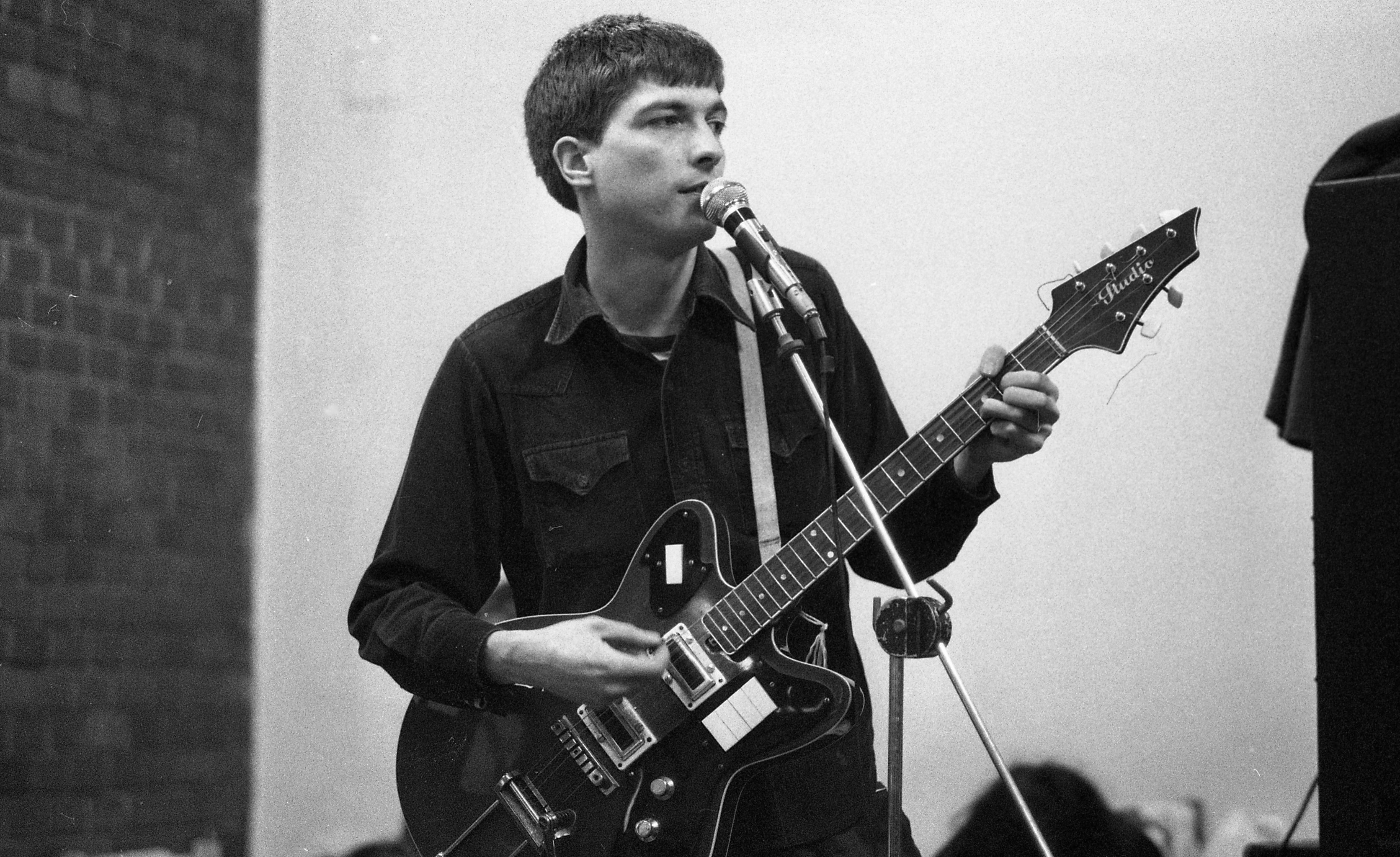 Víg Mihály a Kassák Klubban